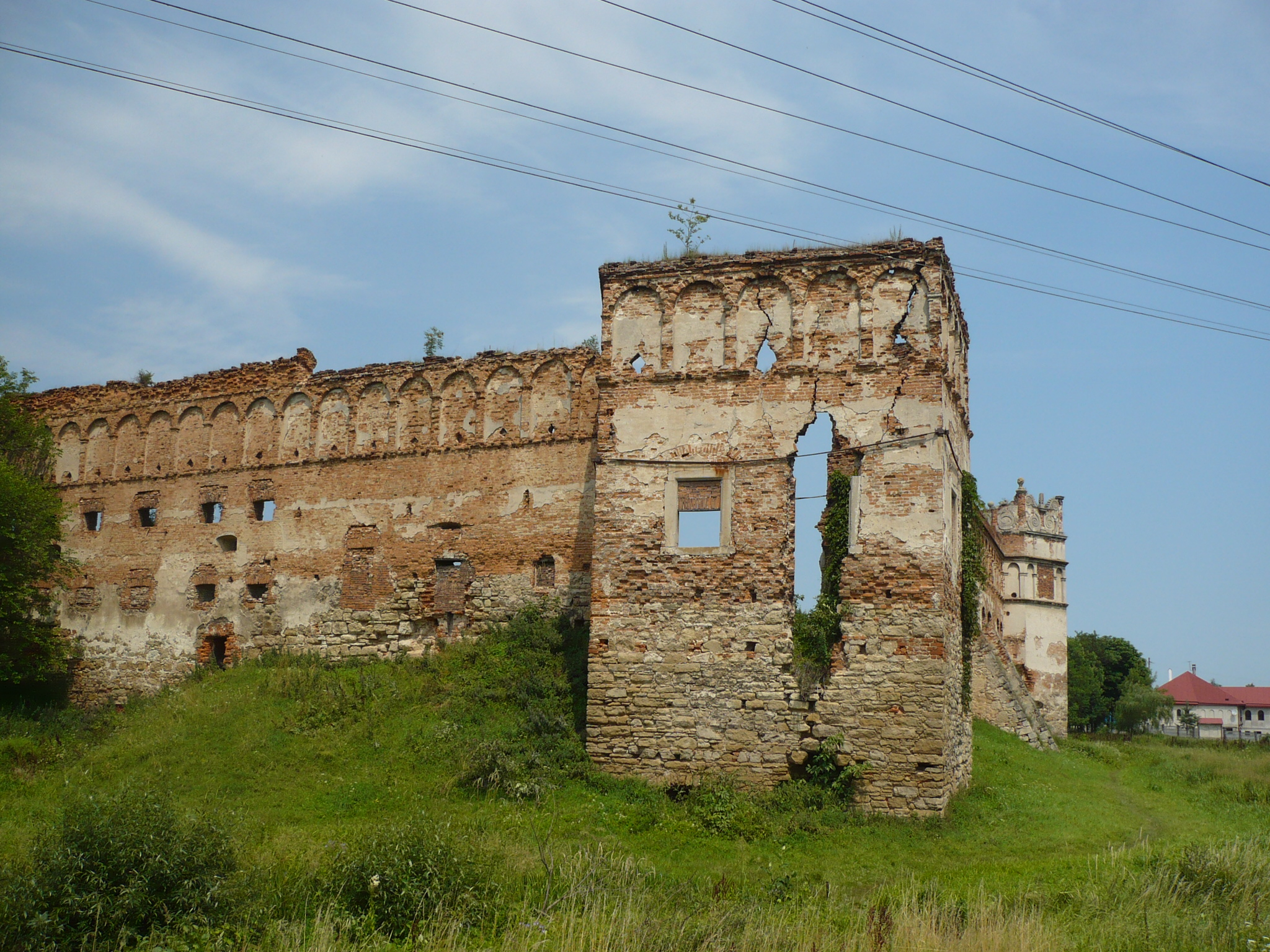 Stare Sioło - zamek księcia Zasławskiego, wieża.